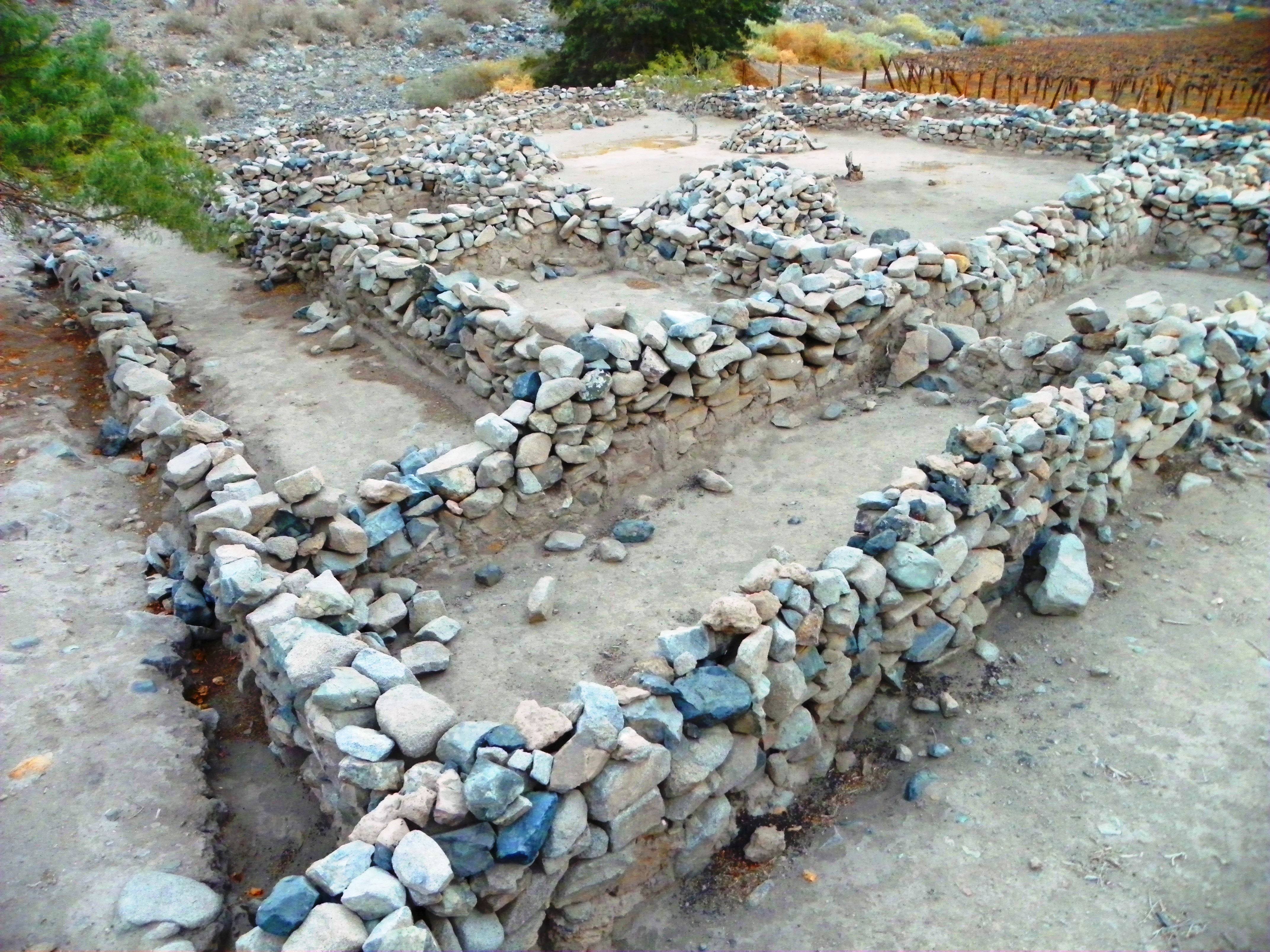 Vista desde una de las esquinas del recinto en direccion noroeste